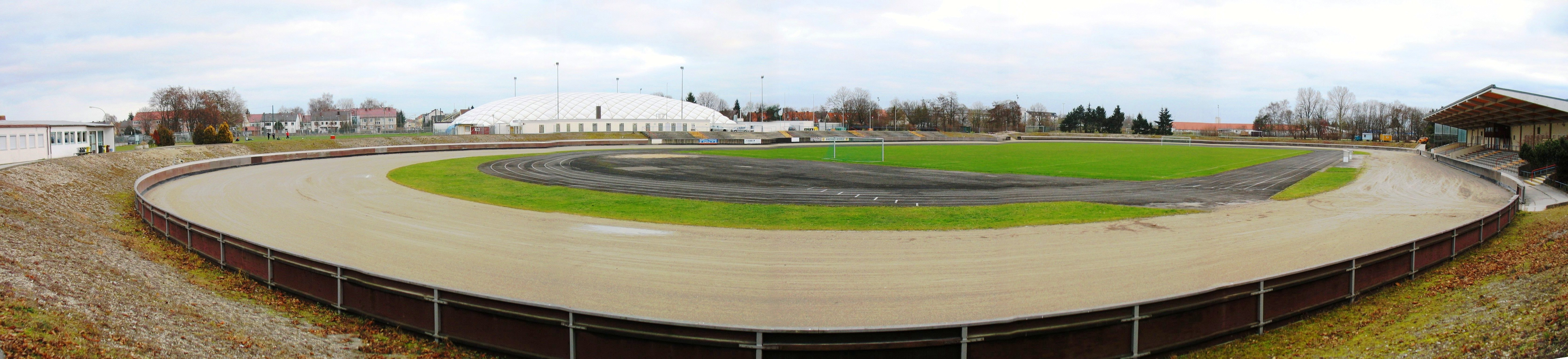 Stadion Haunstetten (Stadtteil von Augsburg)